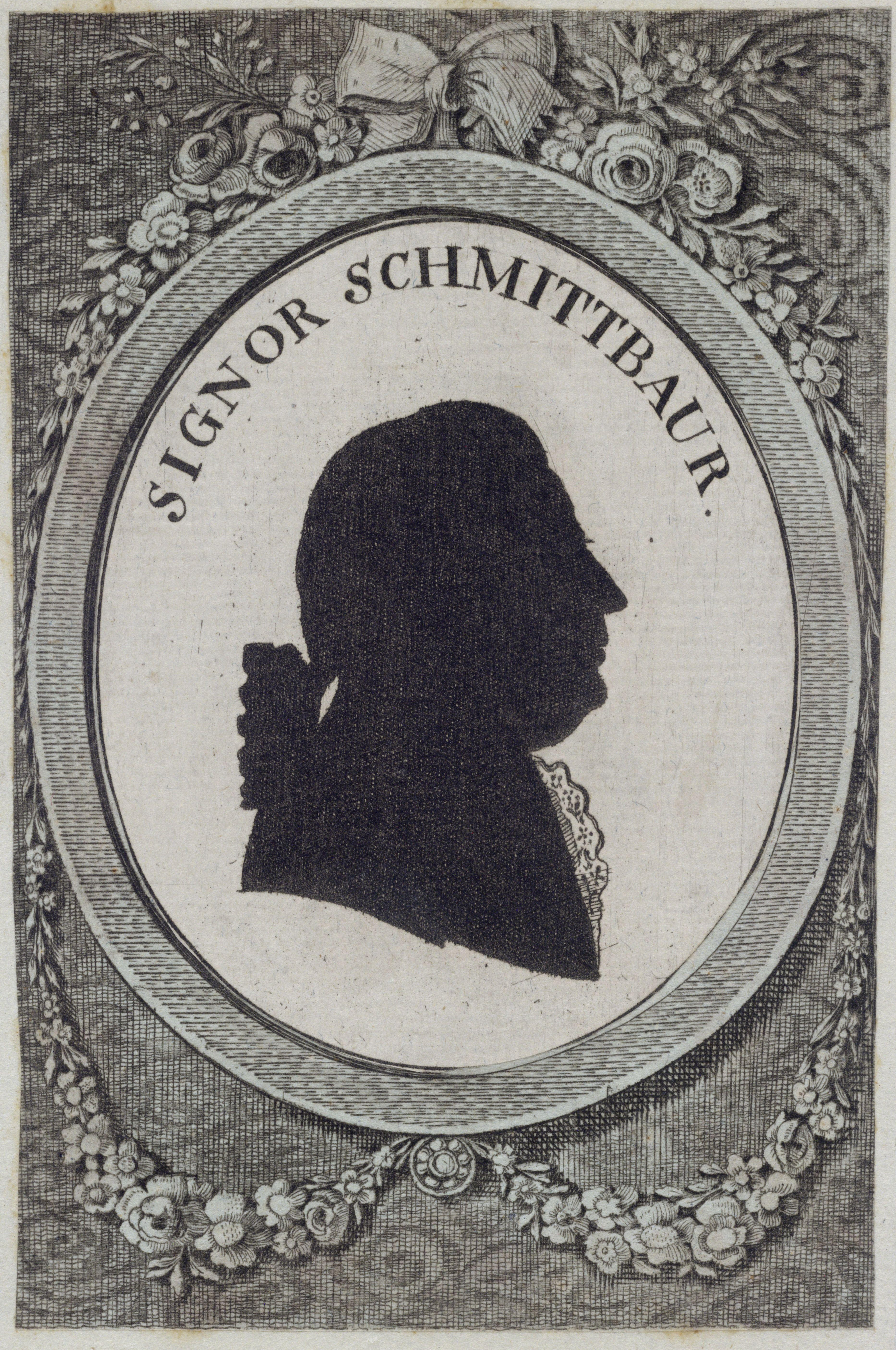 Joseph Aloys Schmittbaur, Komponist, Silhouette